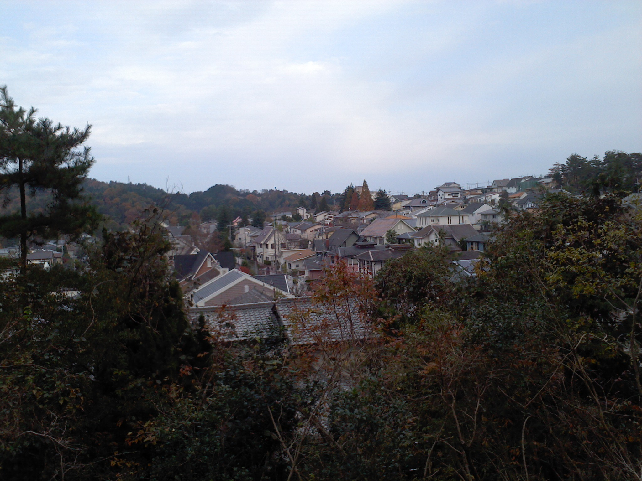 滋賀県大津市比叡平